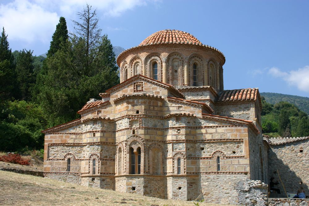 Mystras (Grèce) : église byzantine